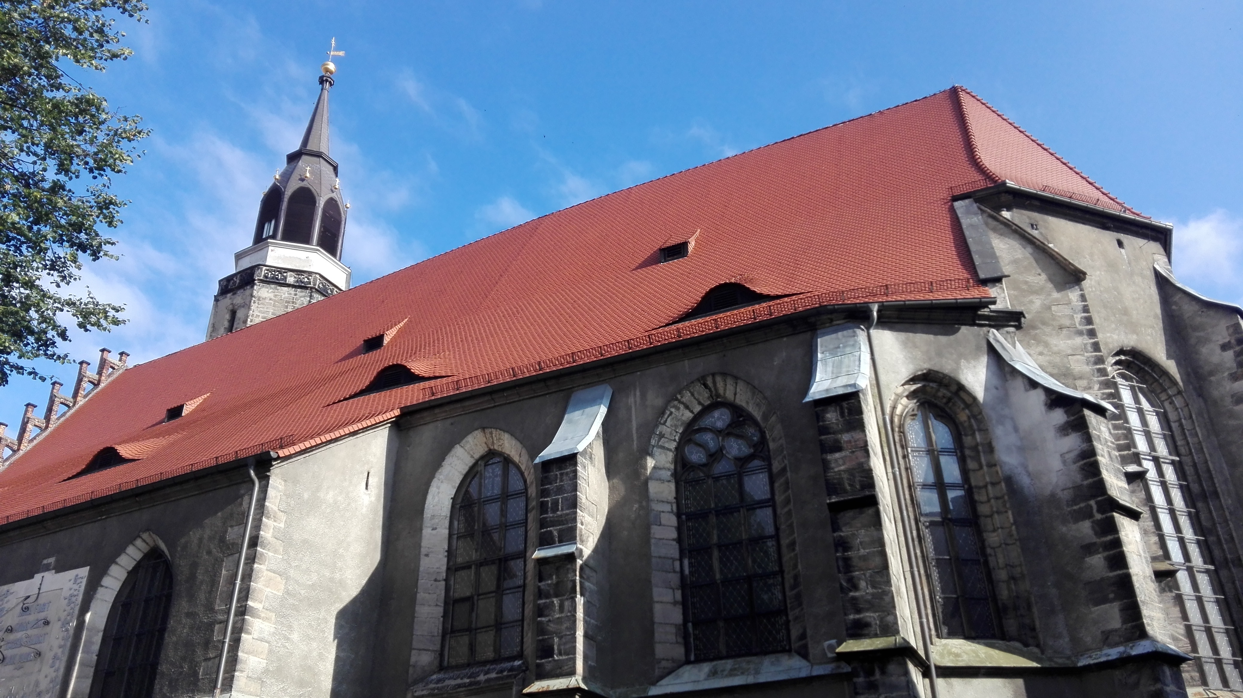 Bolesławiecka Bazylika Maryjna tuż przed remontem elewacji.